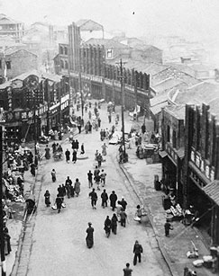 抗戰時期的桂林